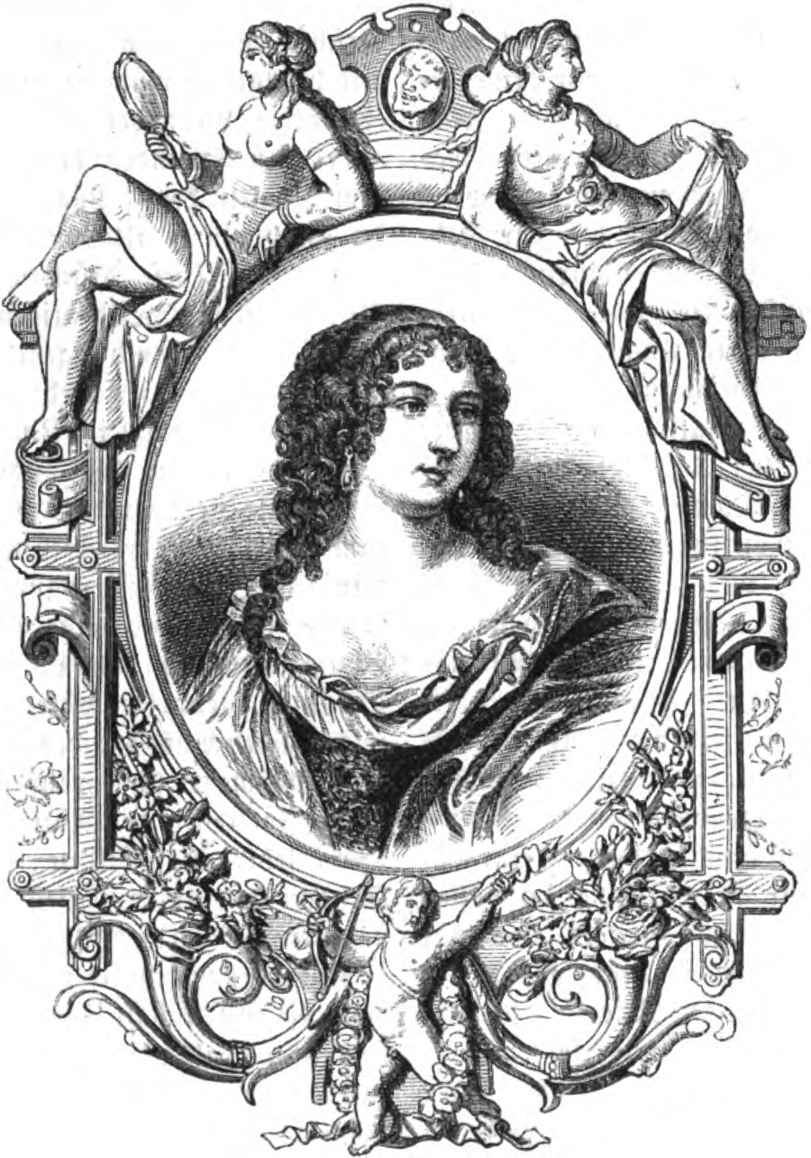 Marion Delorme, französische Kurtisane im 17. Jh.